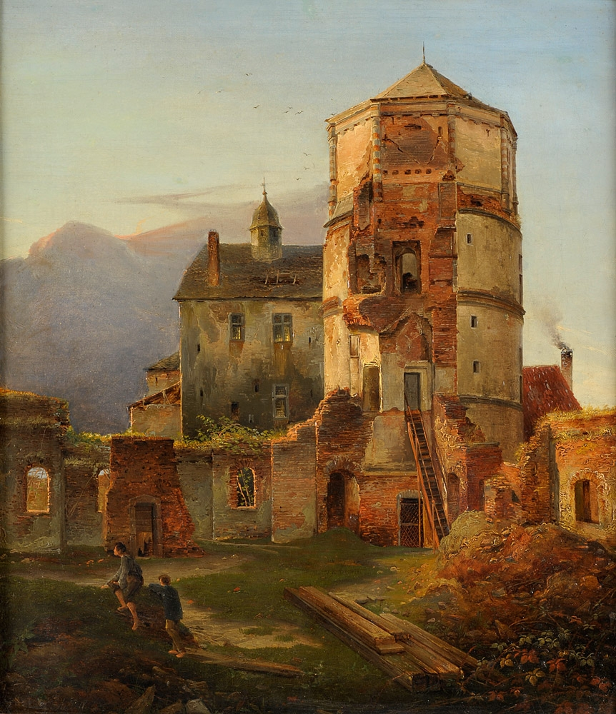 Burgruinen. Signiert. Öl/Lwd./doubl., 46 x 39,5 cm